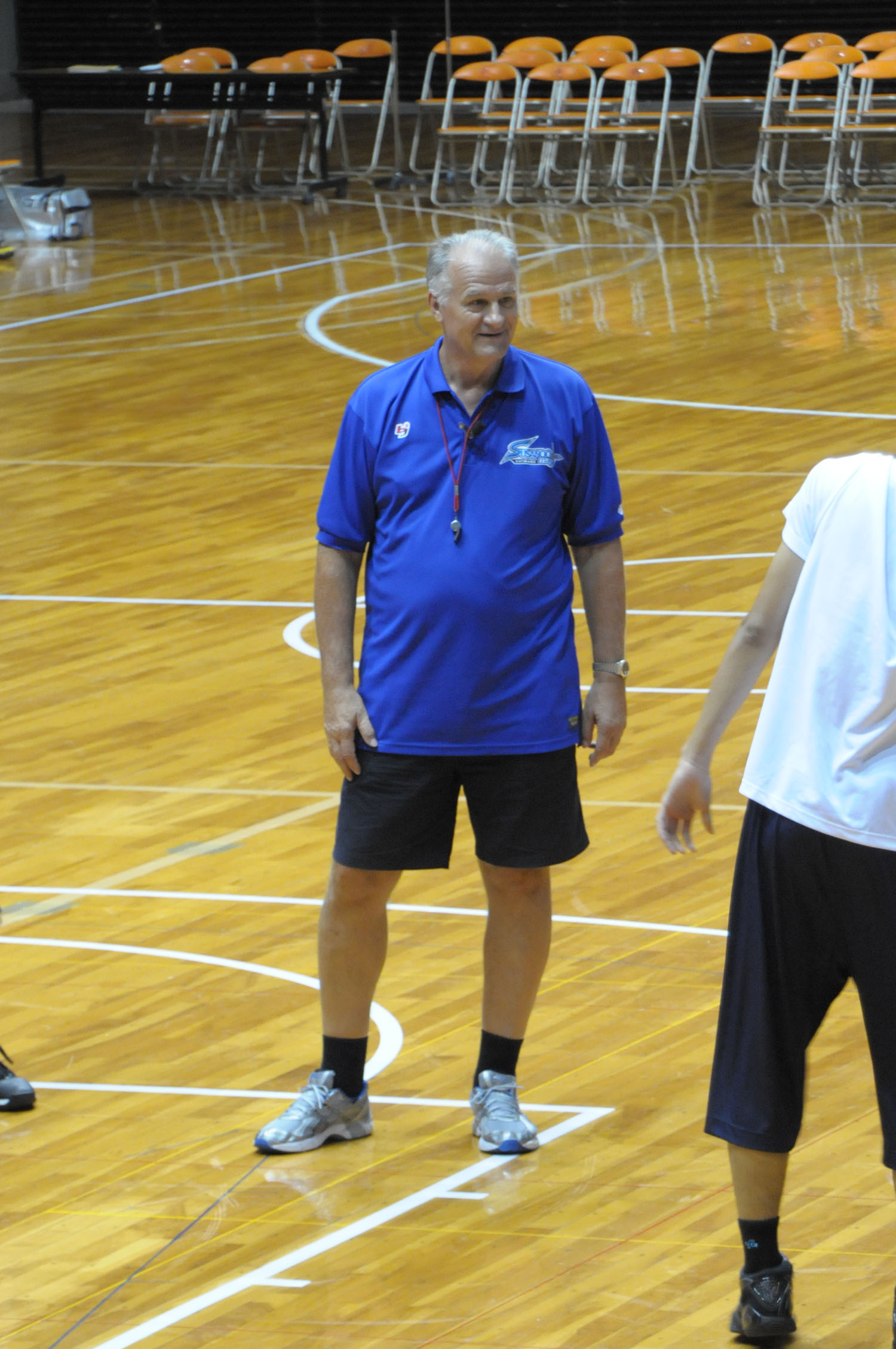 島根スサノオマジック、ジェリコ・パブリセヴィッチヘッドコーチ。横浜文化体育館で。